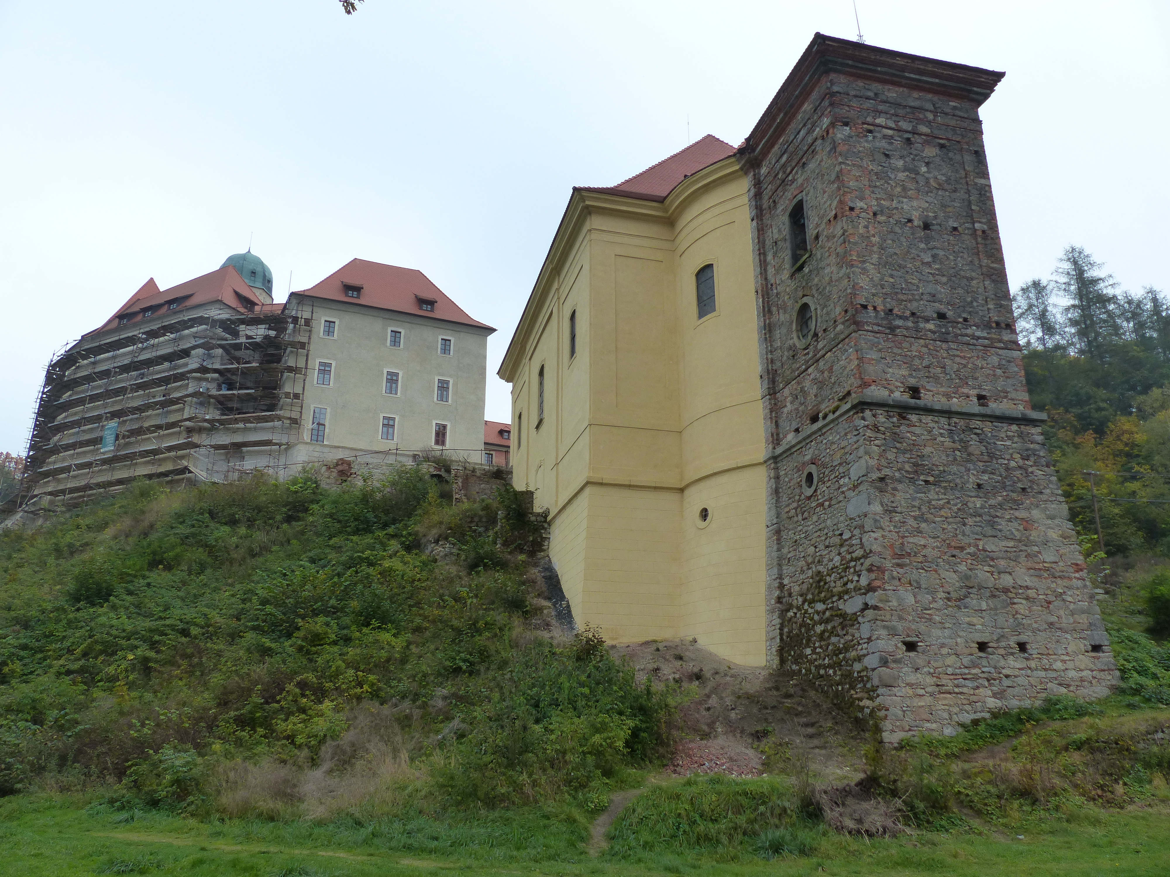 Ansicht von Schloss Libá